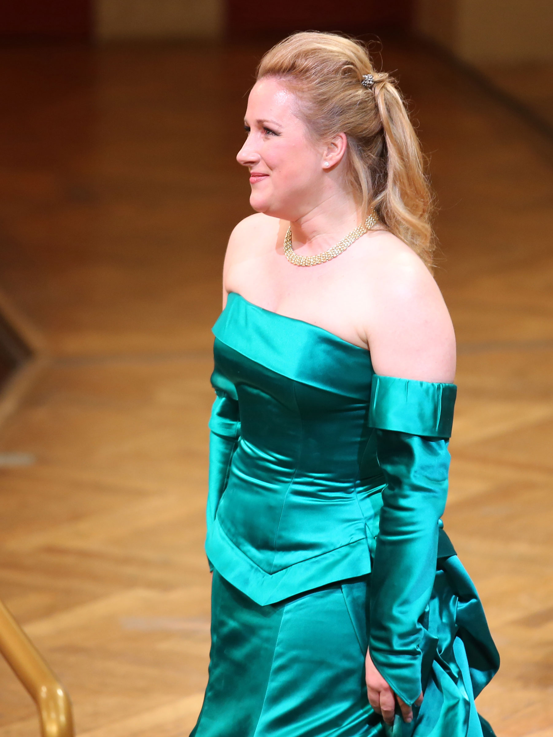 Diana Damra, Sopran